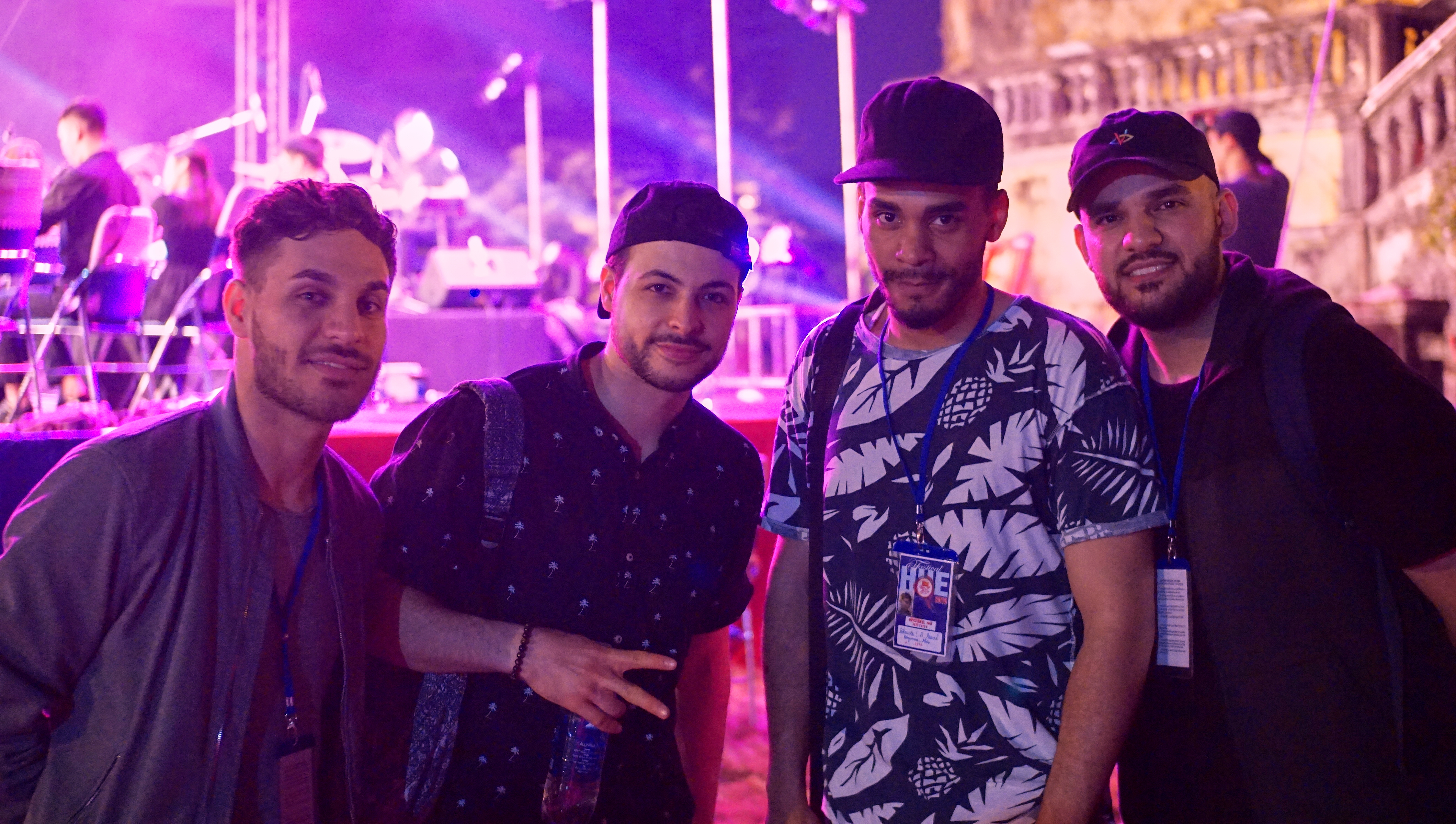 Giấy phép